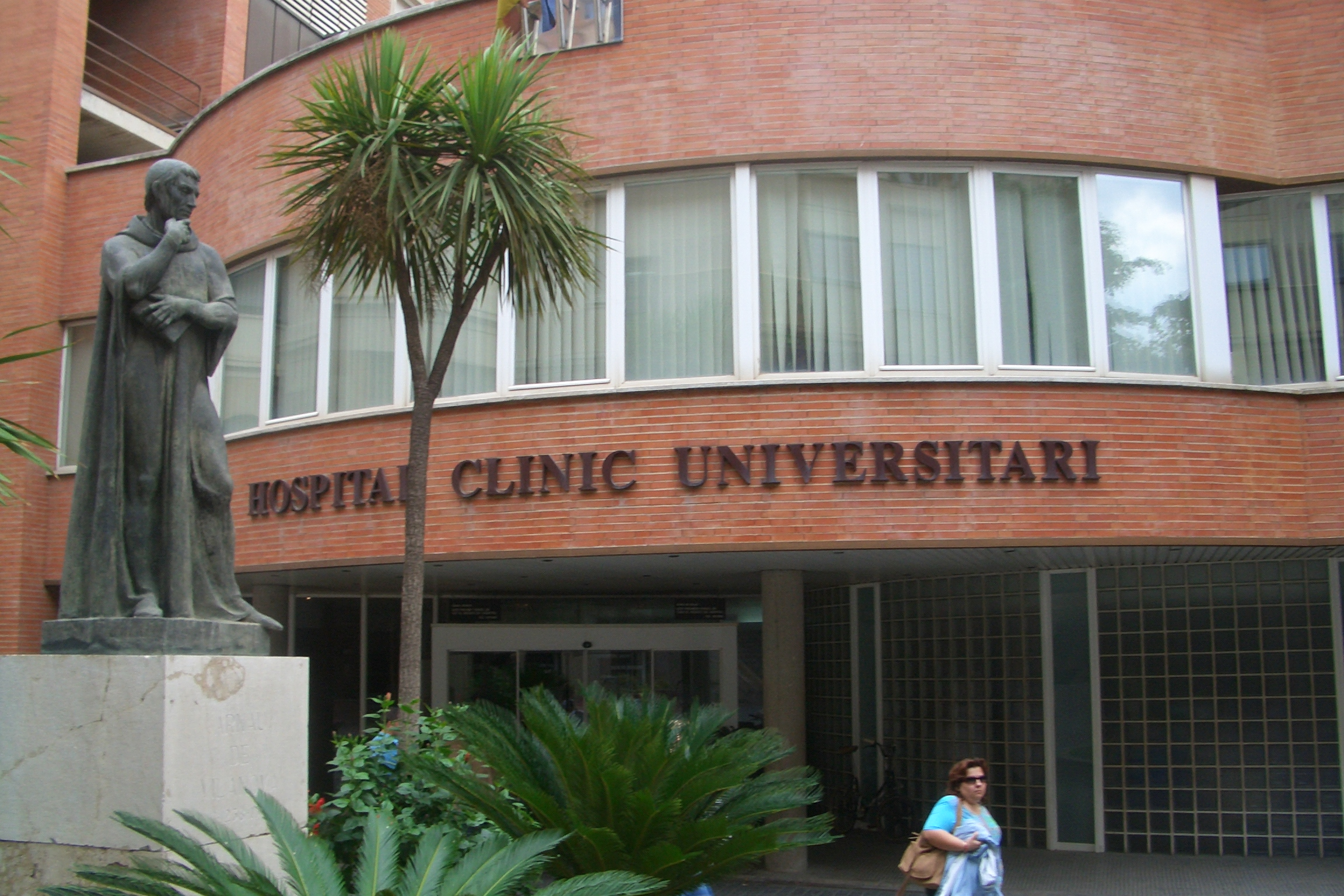 Entrada principal del Hospital Clínico Universitario de Valencia